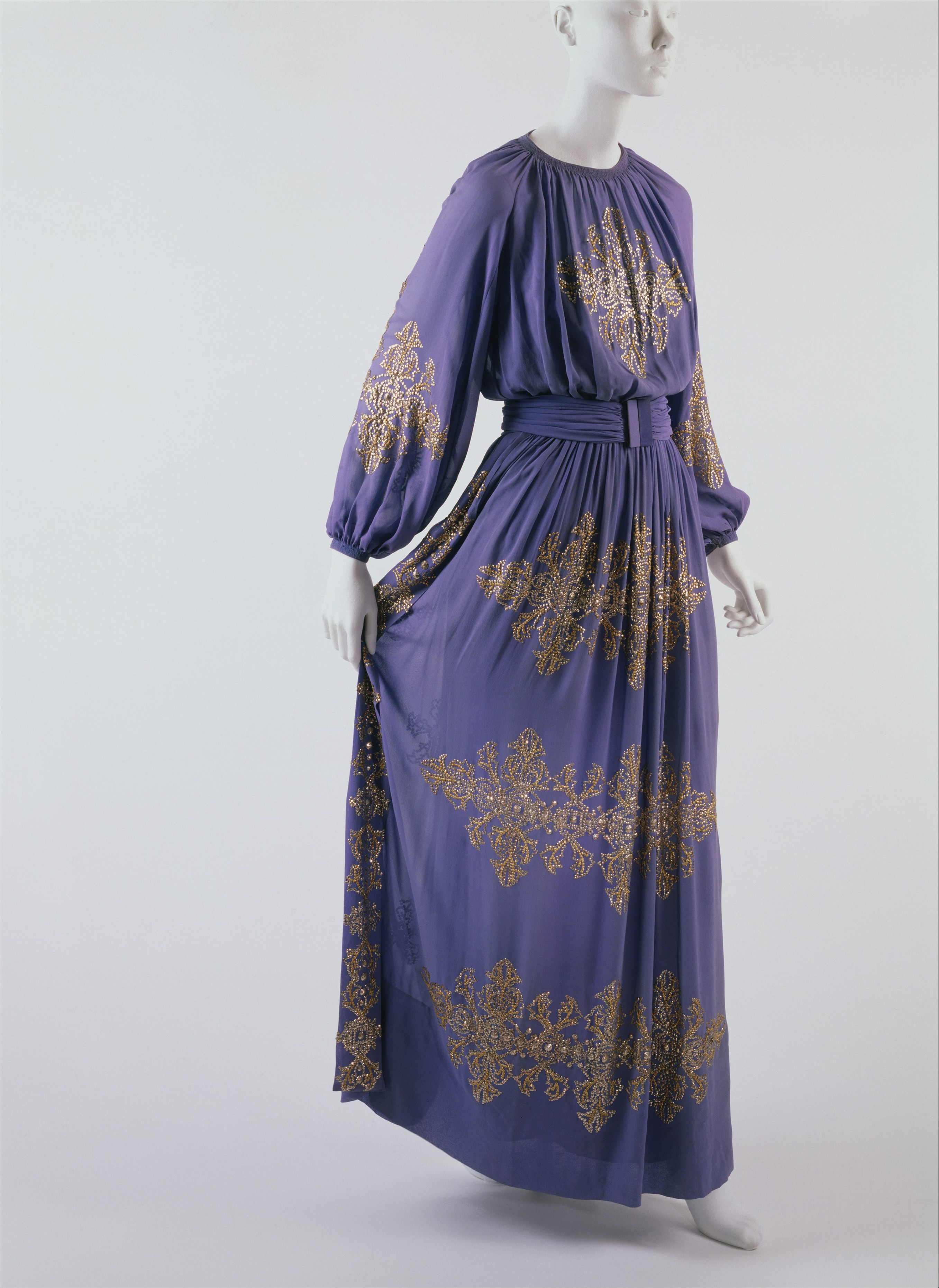 French; Dinner dress